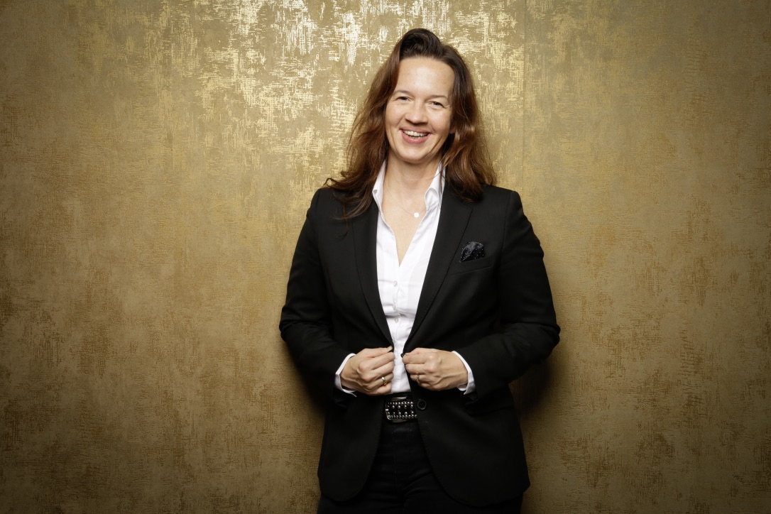 Foto von Maximiliane Wilkesmann